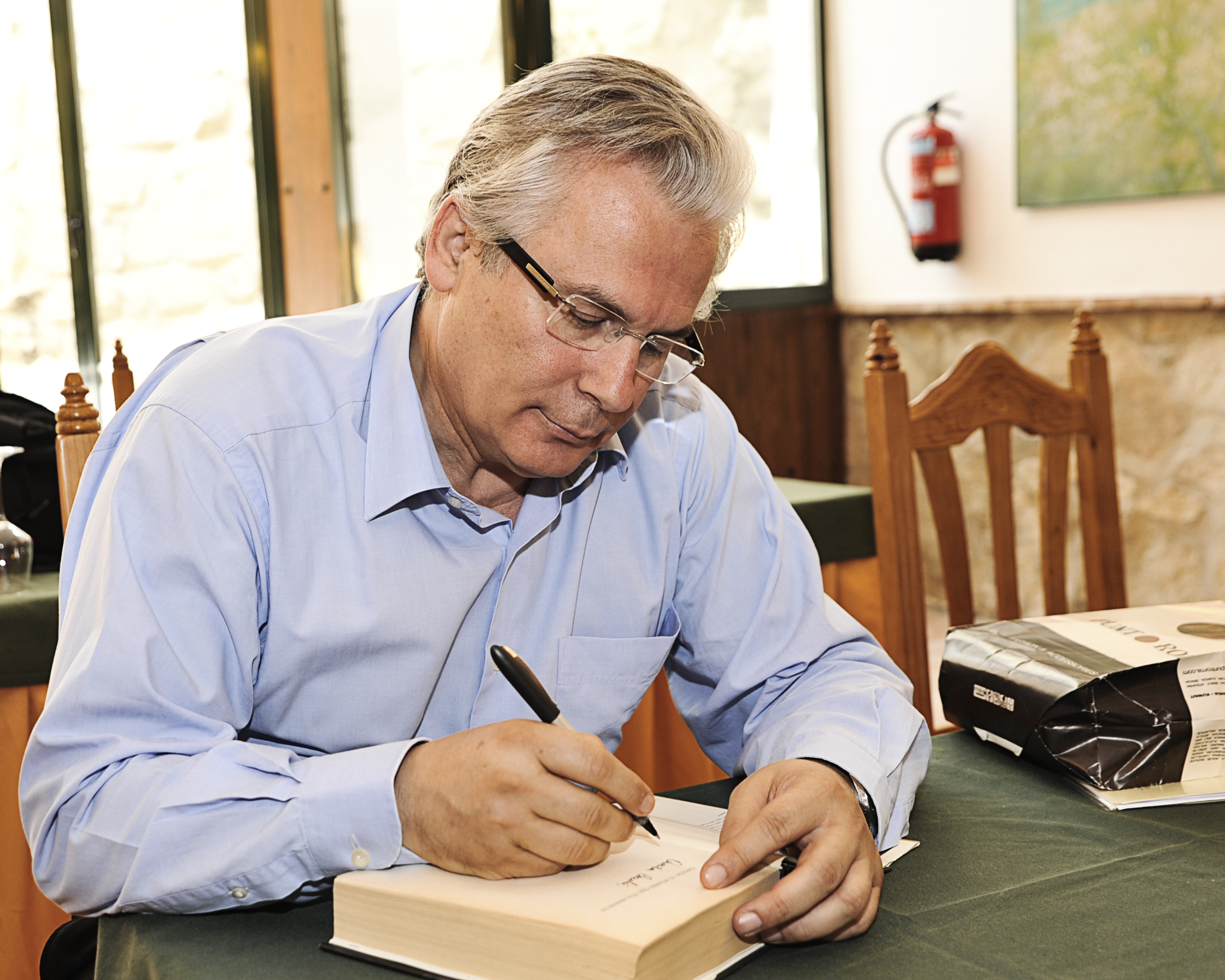 Garzón en su pueblo natal, Torres, en julio de 2012